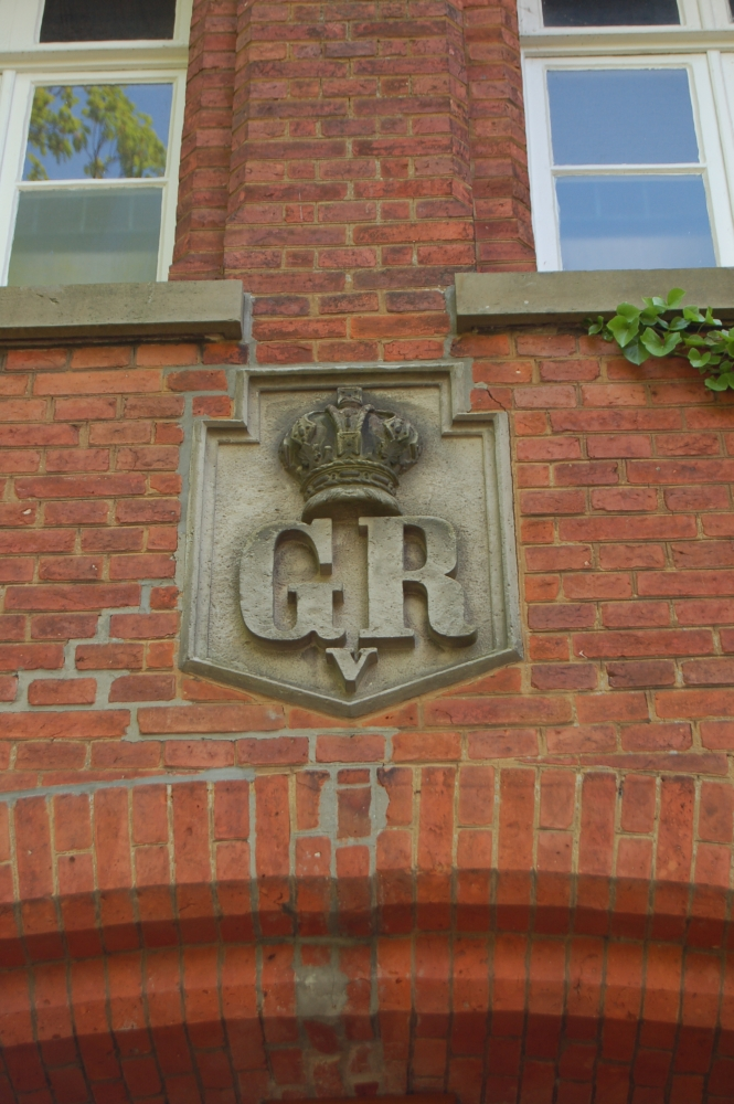 Stein über dem Eingang des alten Gefängnis in Zeven